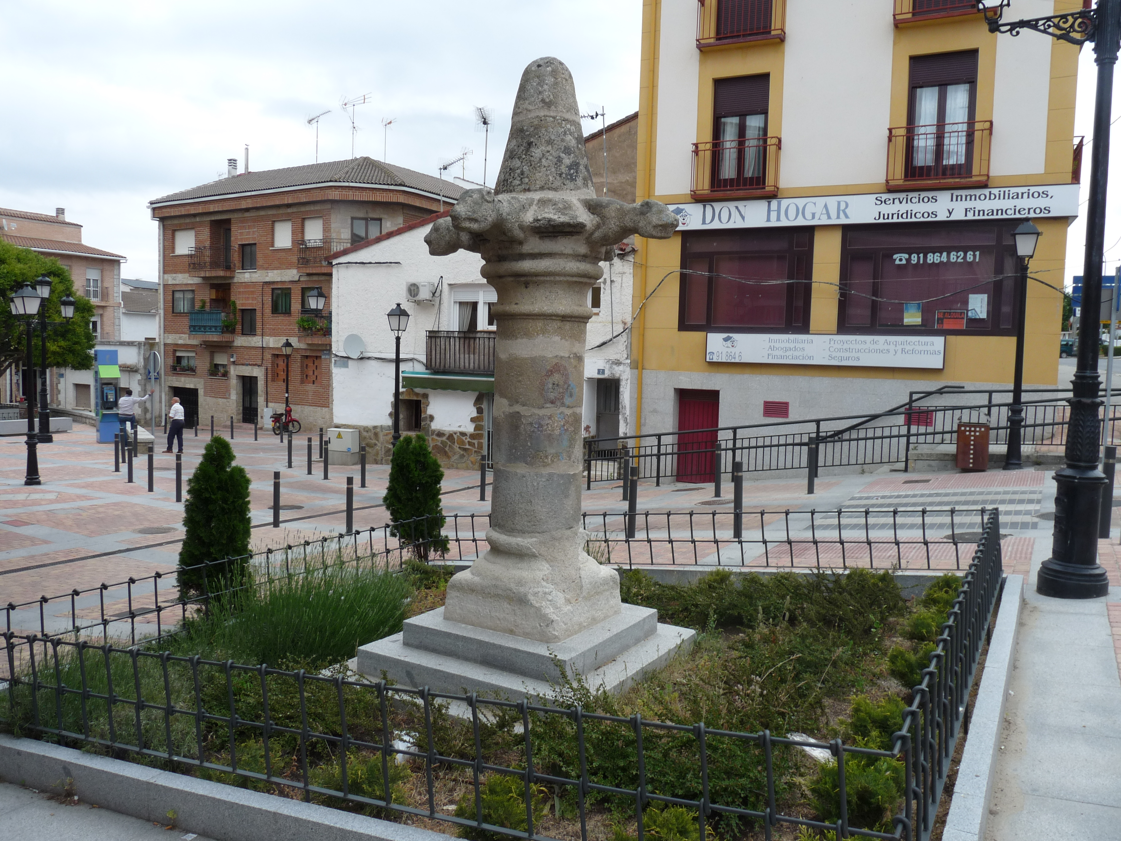 Picota de Pelayos de la Presa, Comunidad de Madrid, España